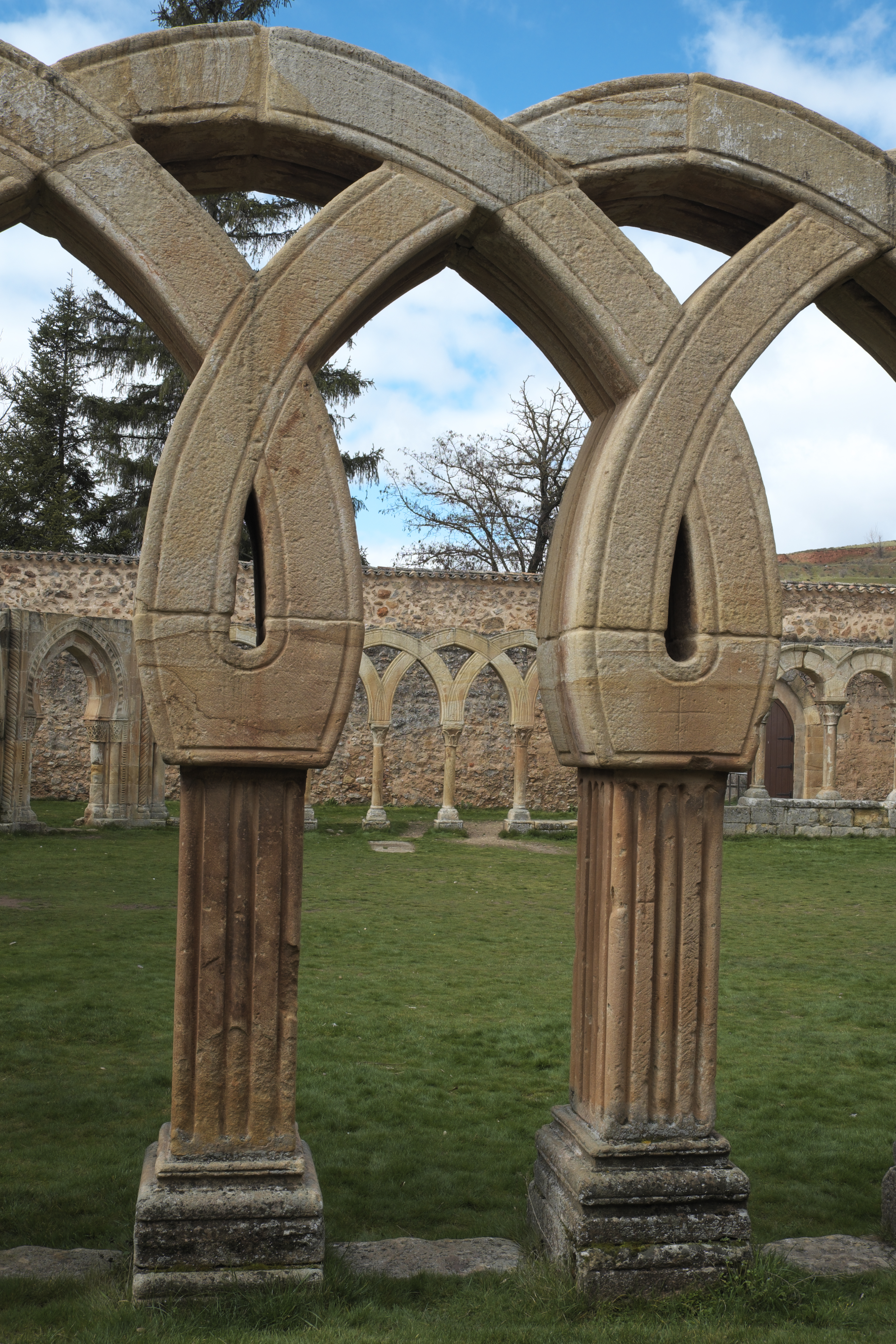 Kreuzgang des ehemaligen Johanniter-Klosters San Juan de Duero in Soria (Kastilien-León/Spanien)